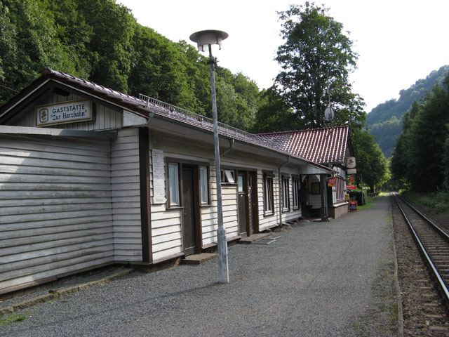 Bahnhof Netzkater